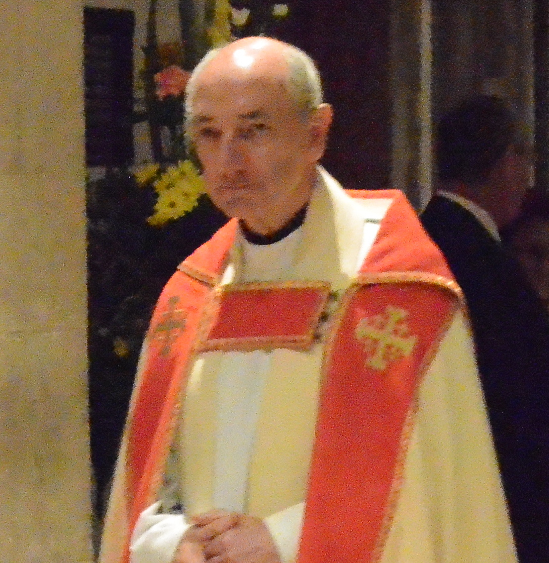 David Lowman, Mina Smallman, Robin King